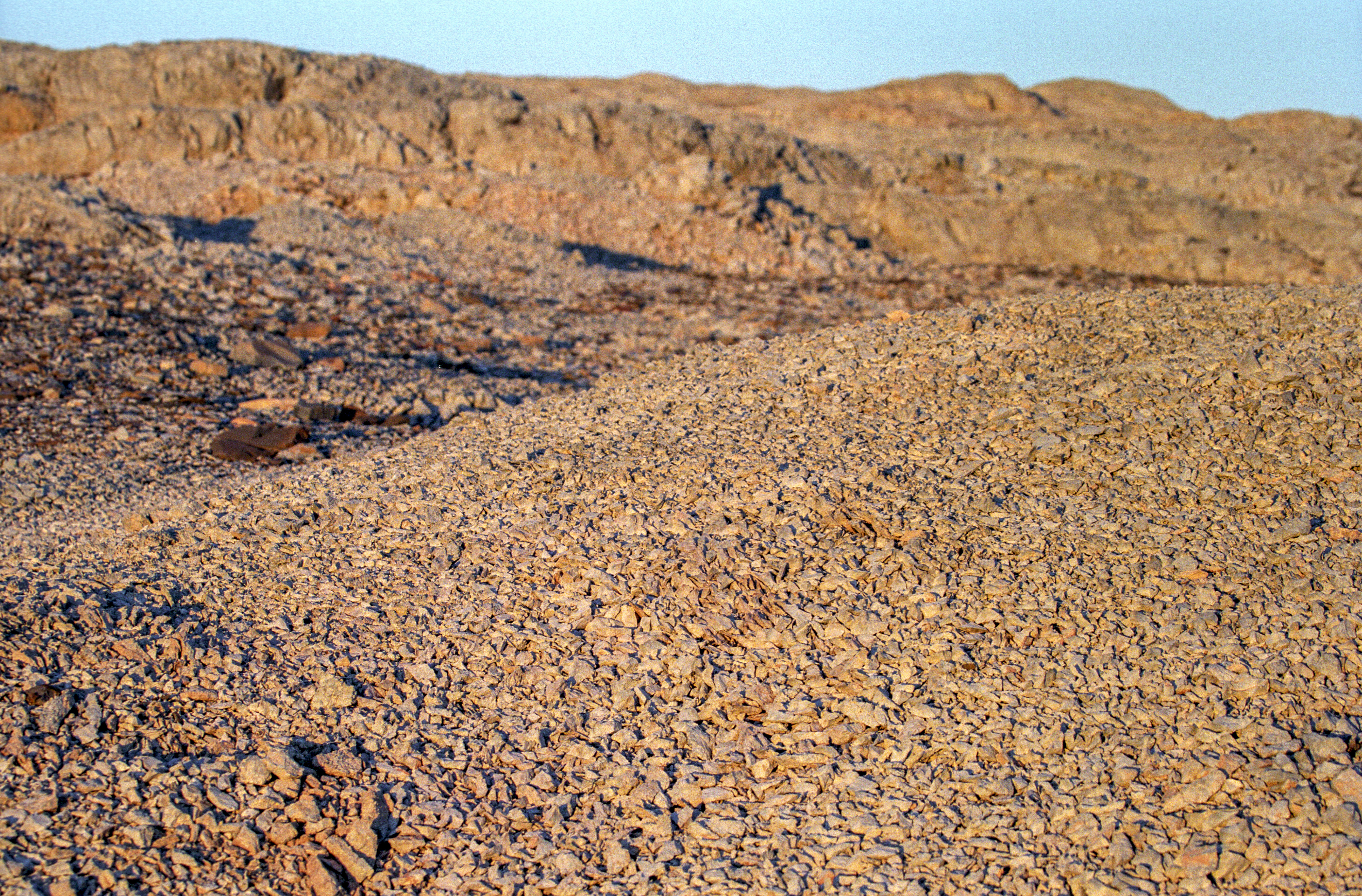 Svalbard, Nordaustlandet